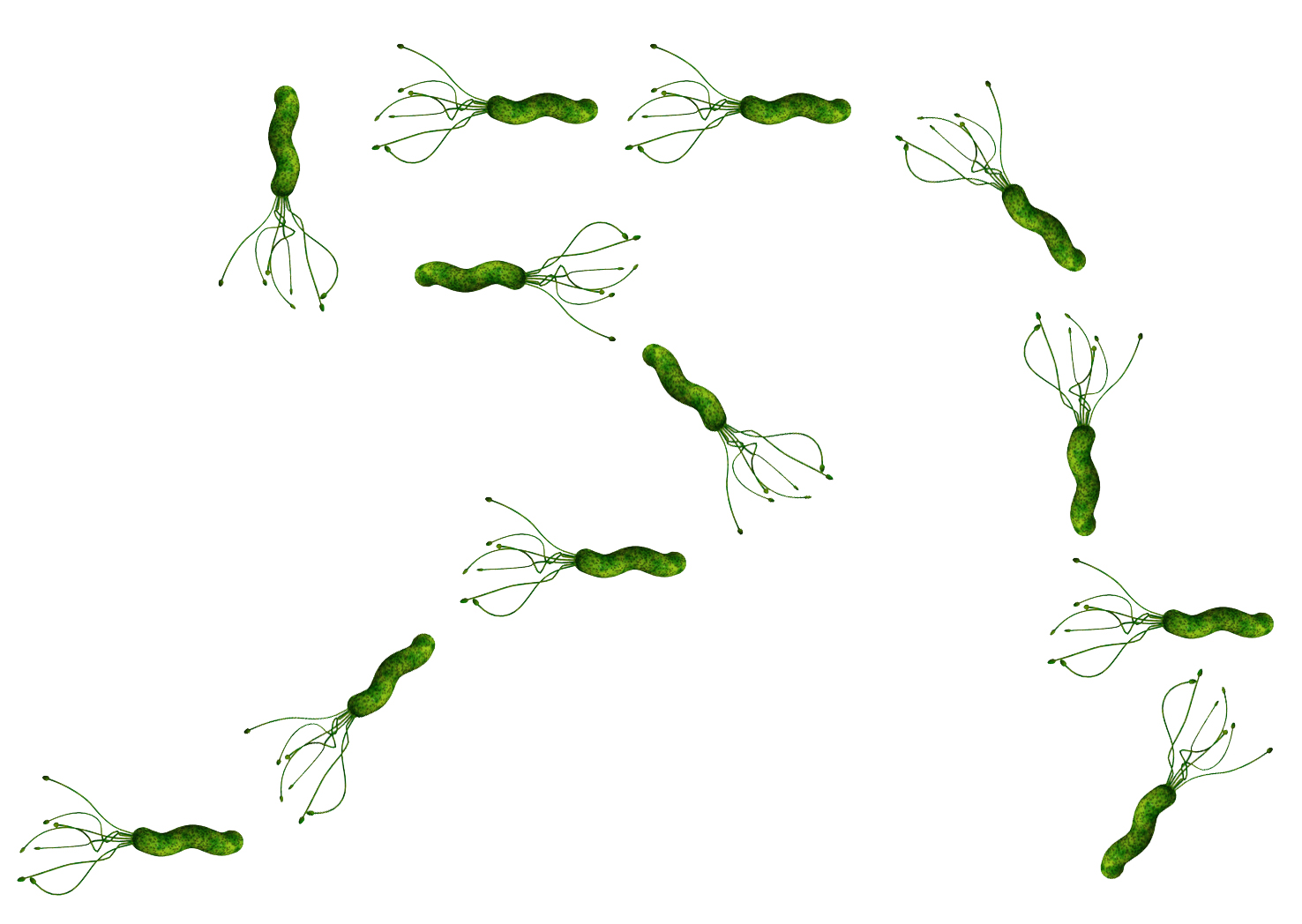 מהלך אקראי של בקטריה